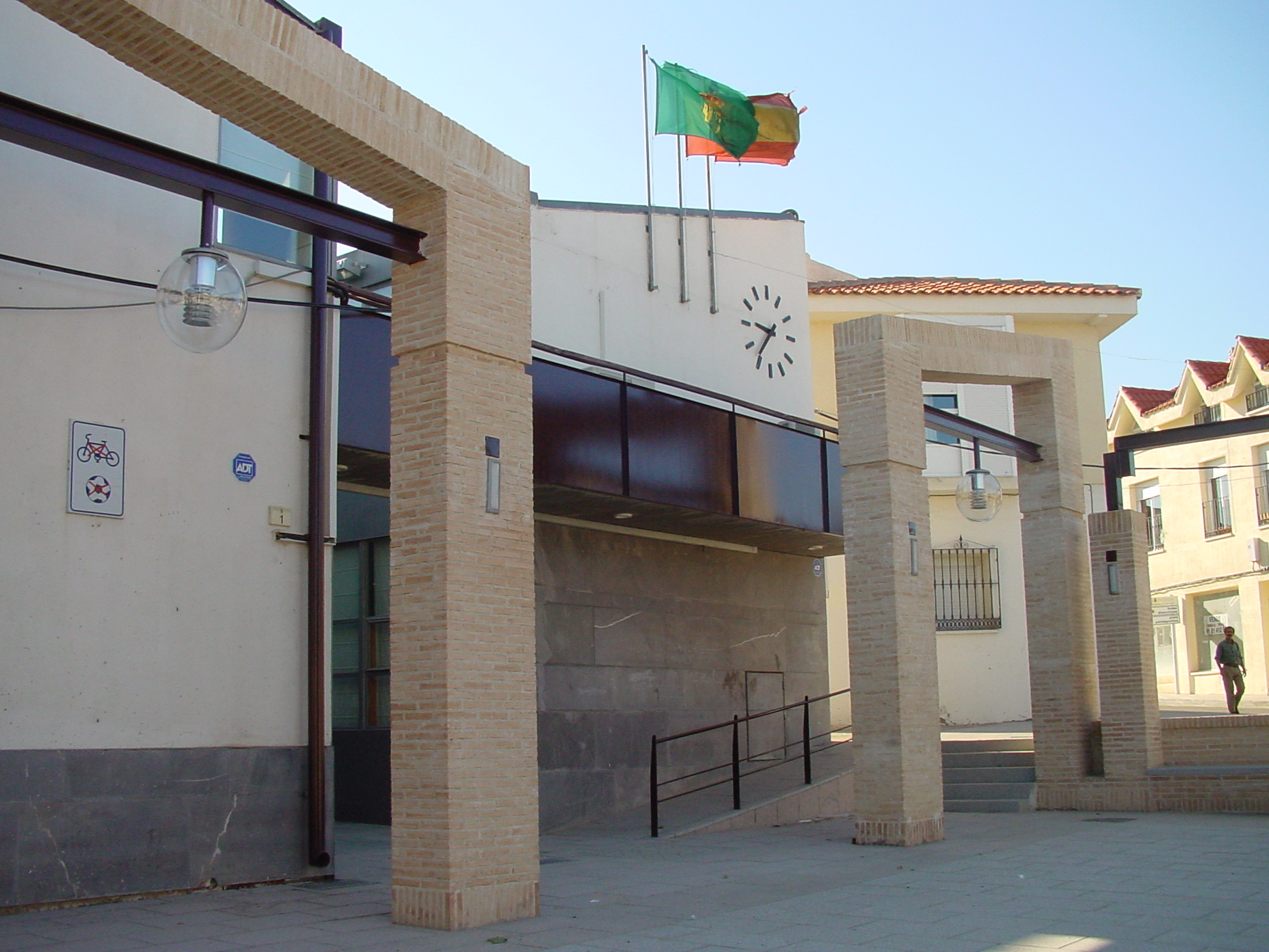 Ayuntamiento de Serranillos del Valle.